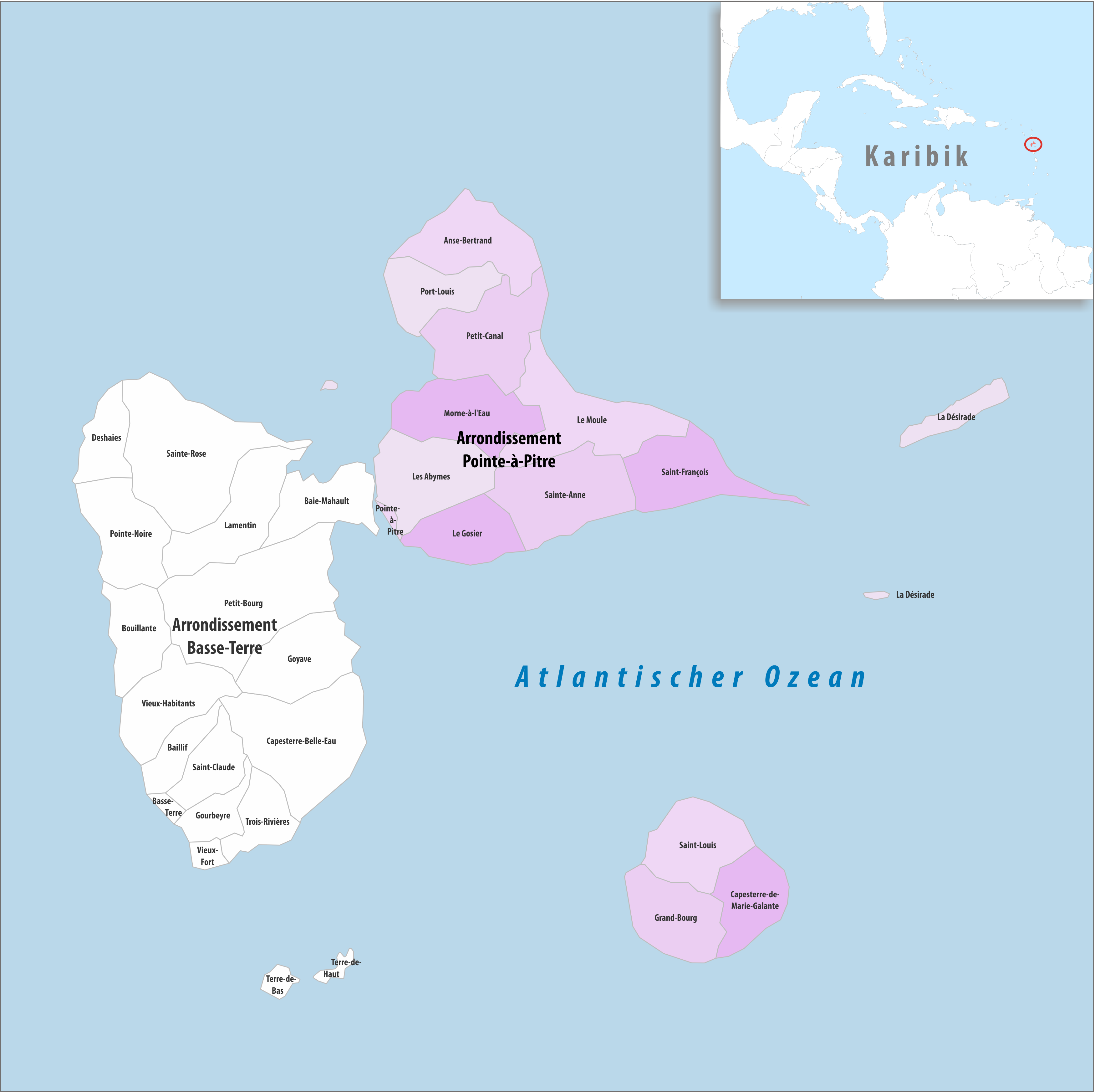 Lage des Arrondissements Pointe-à-Pitre